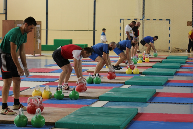 Борьба на помосте, весовая 80 кг, г. Лутраки, Греция, 2017 г.